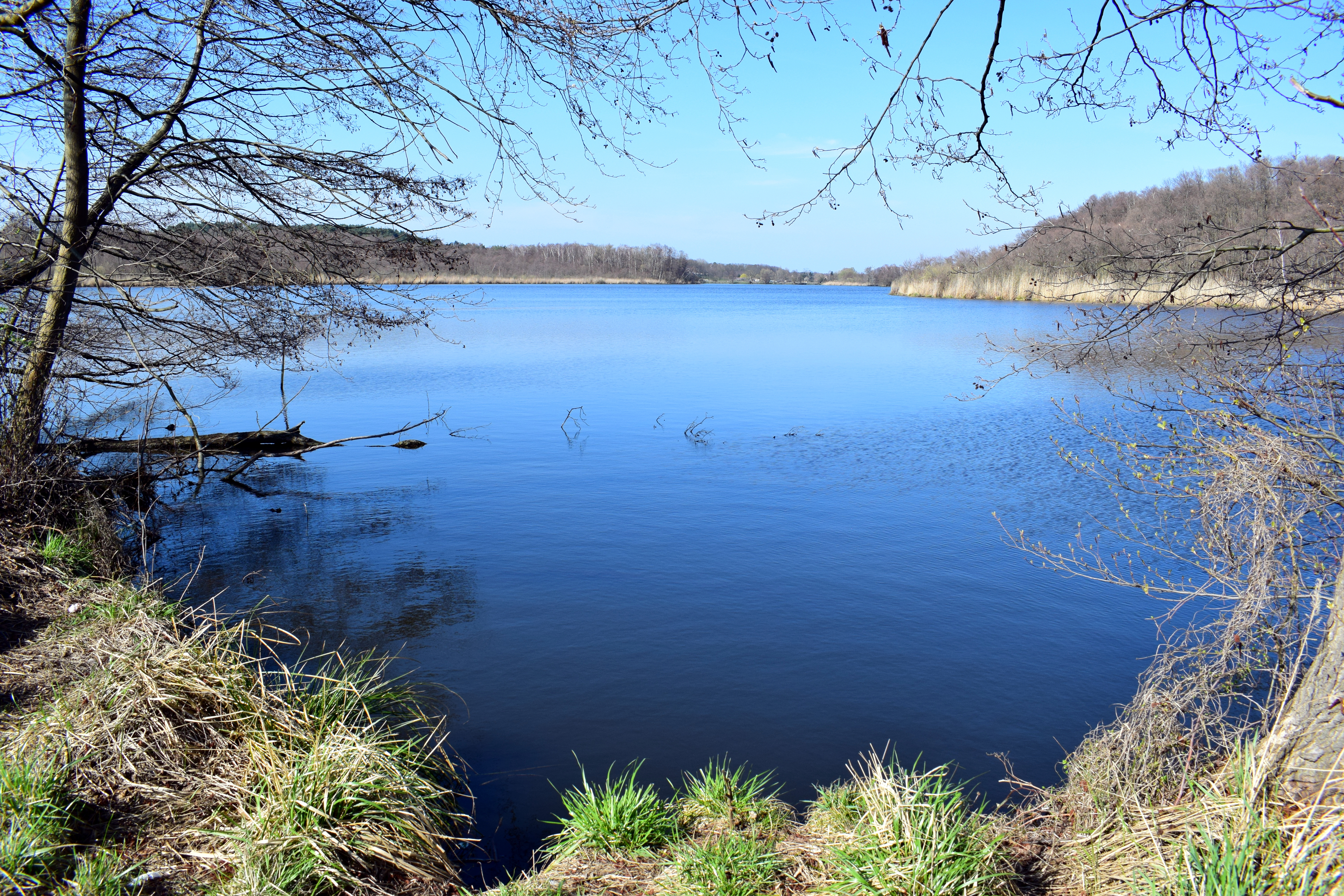 Wernsdorfer, See, Landkreis Dahme-Spreewald, Brandenburg, Deutschland.